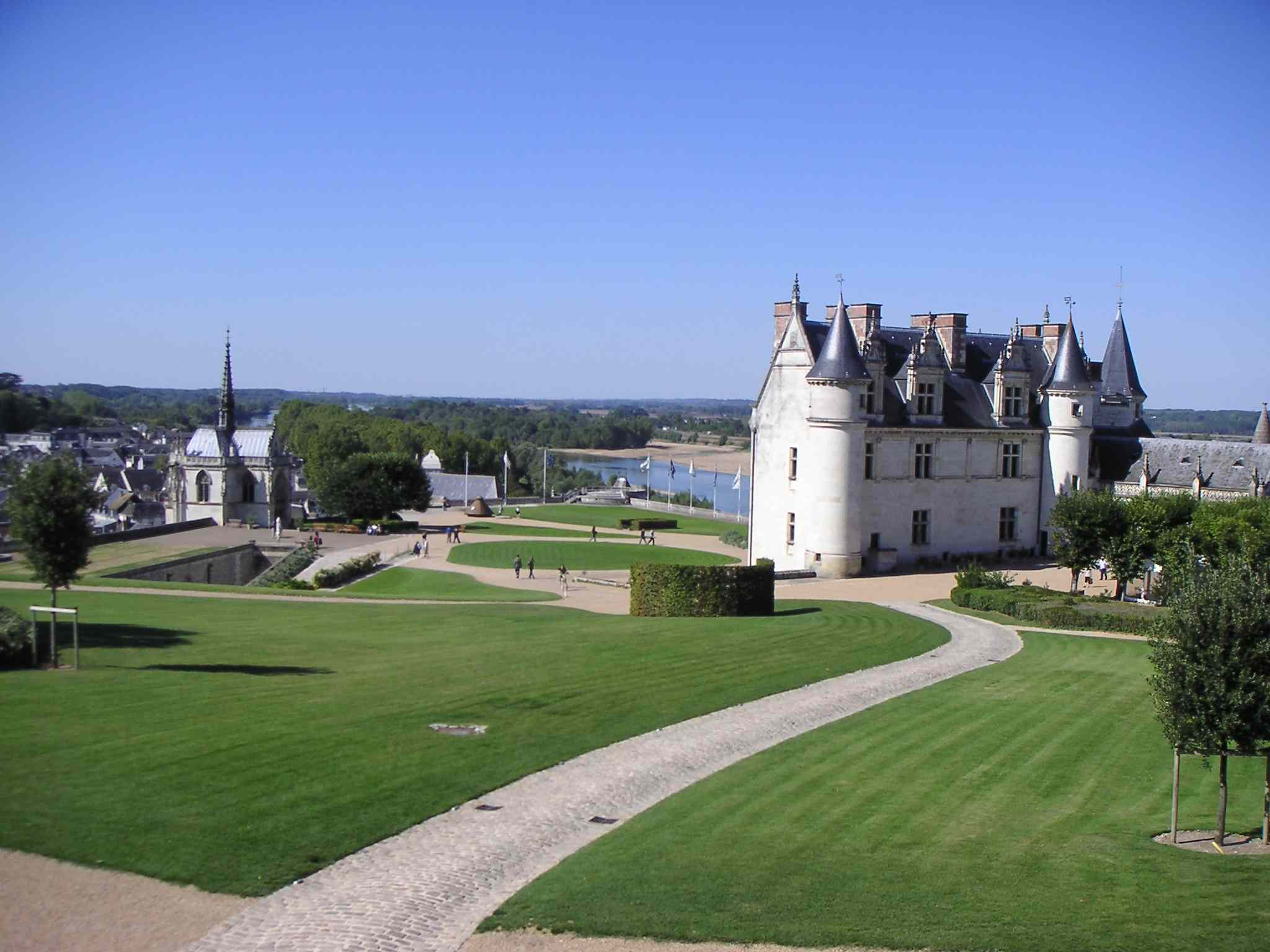 Vue générale de la terrasse du château d'Amboise avec le parc et le Logis royal, ainsi que la chapelle St-Hubert. Auteur : LonganimE